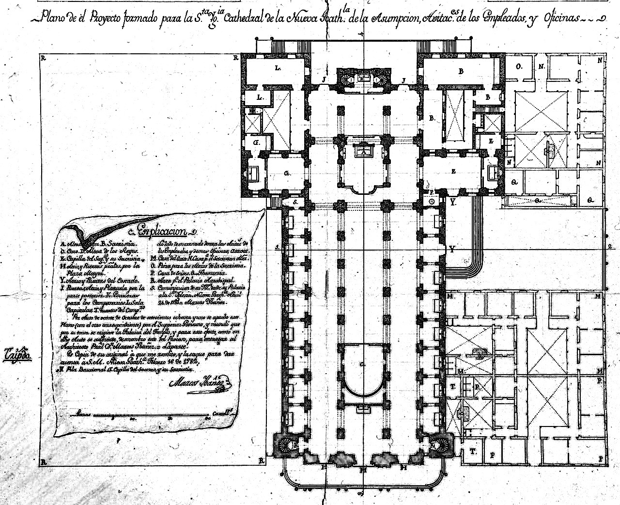 Plano de la Catedral de la Ciudad de Guatemala de 1782.